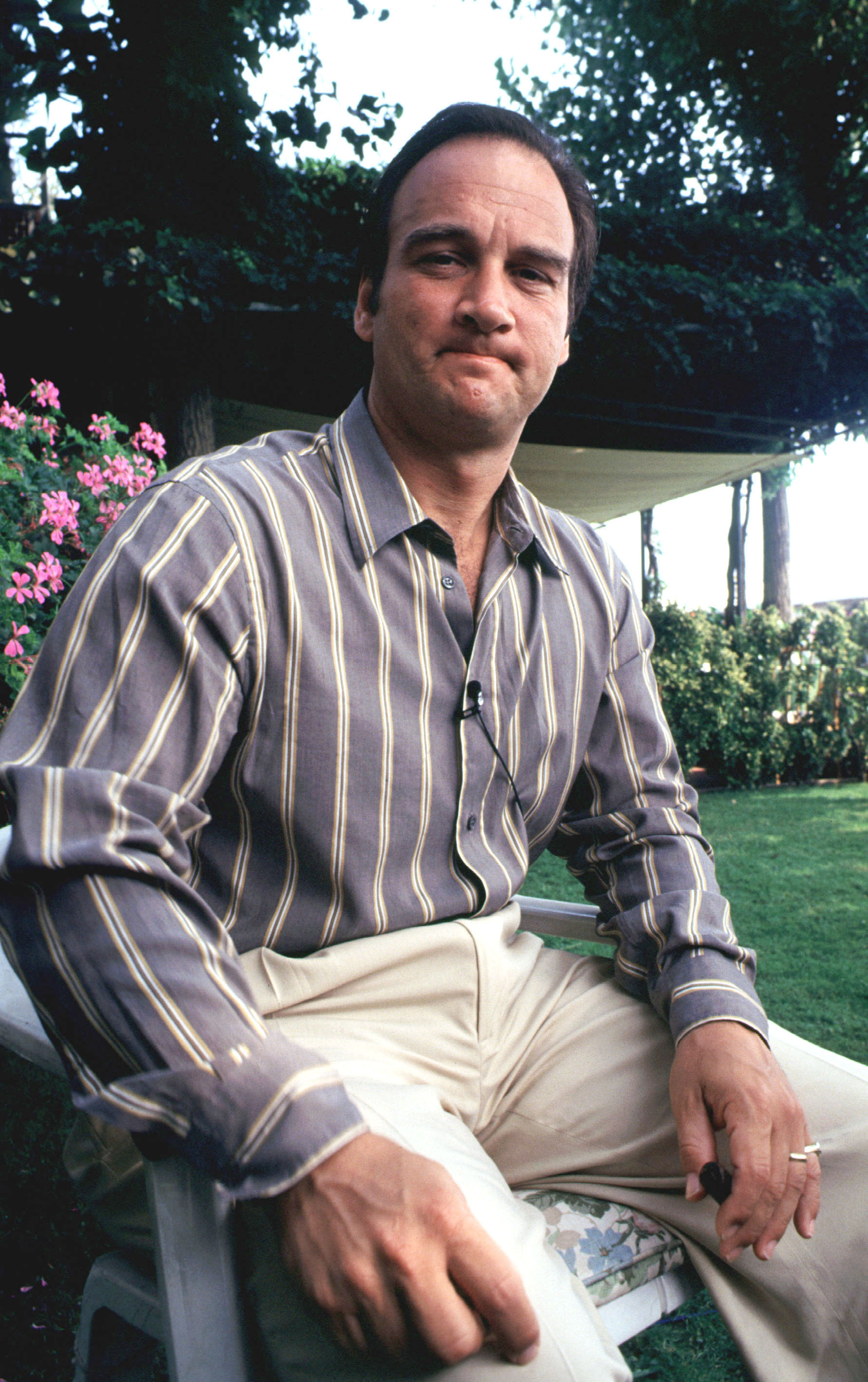 L'attore americano Jim Belushi alla Mostra del cinema di Venezia del 1982